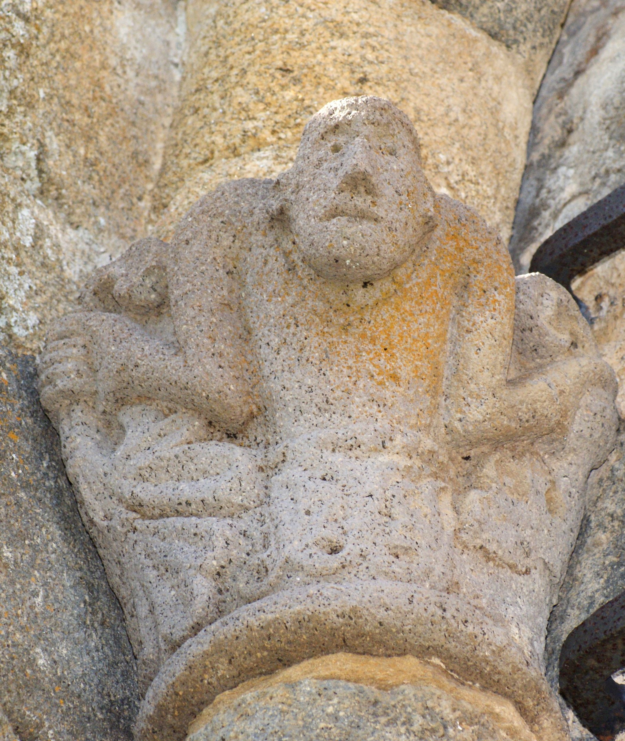 Eglise Saint-Thibaud (chapiteau)